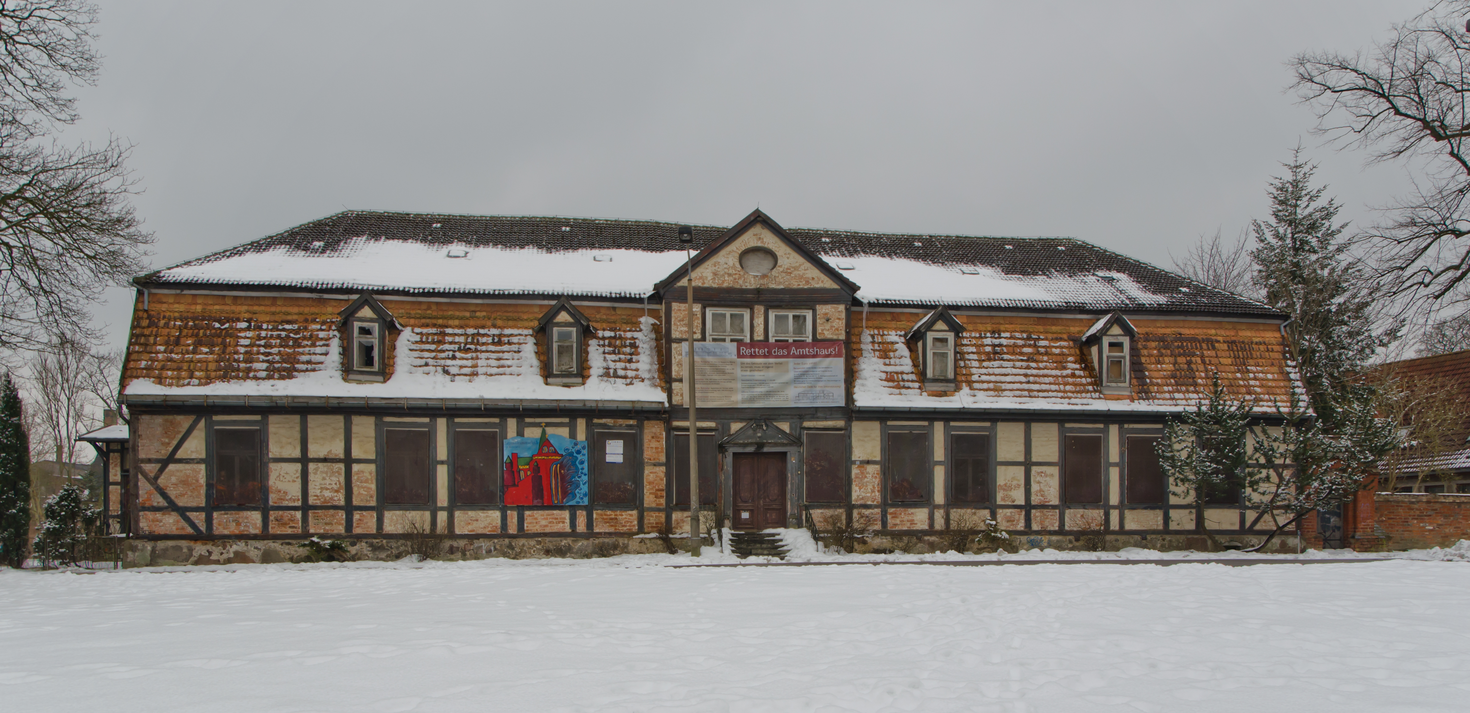 Amtshaus von Norden